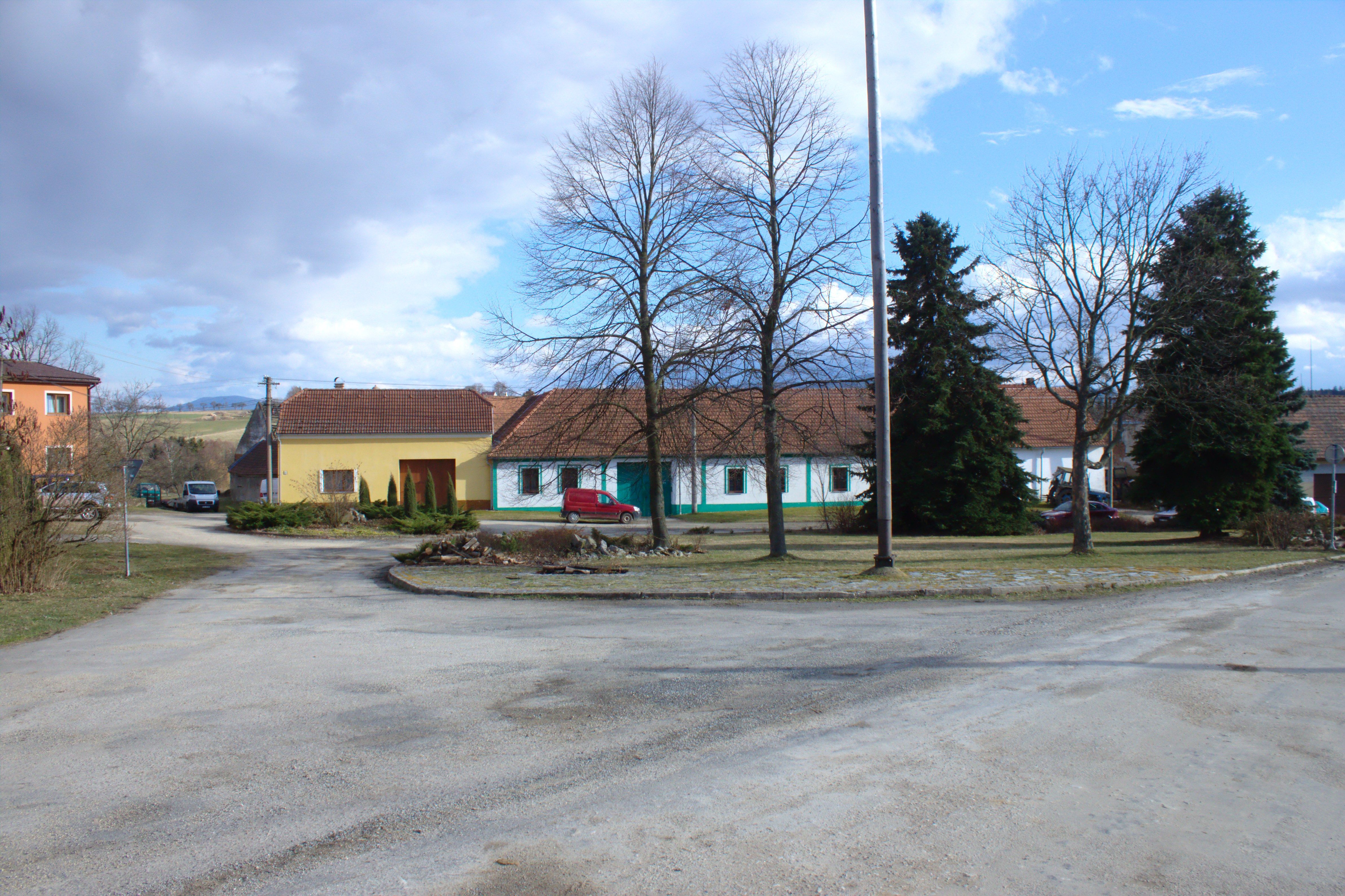 Náves ve vesnici Todně Project: Fotíme Česko